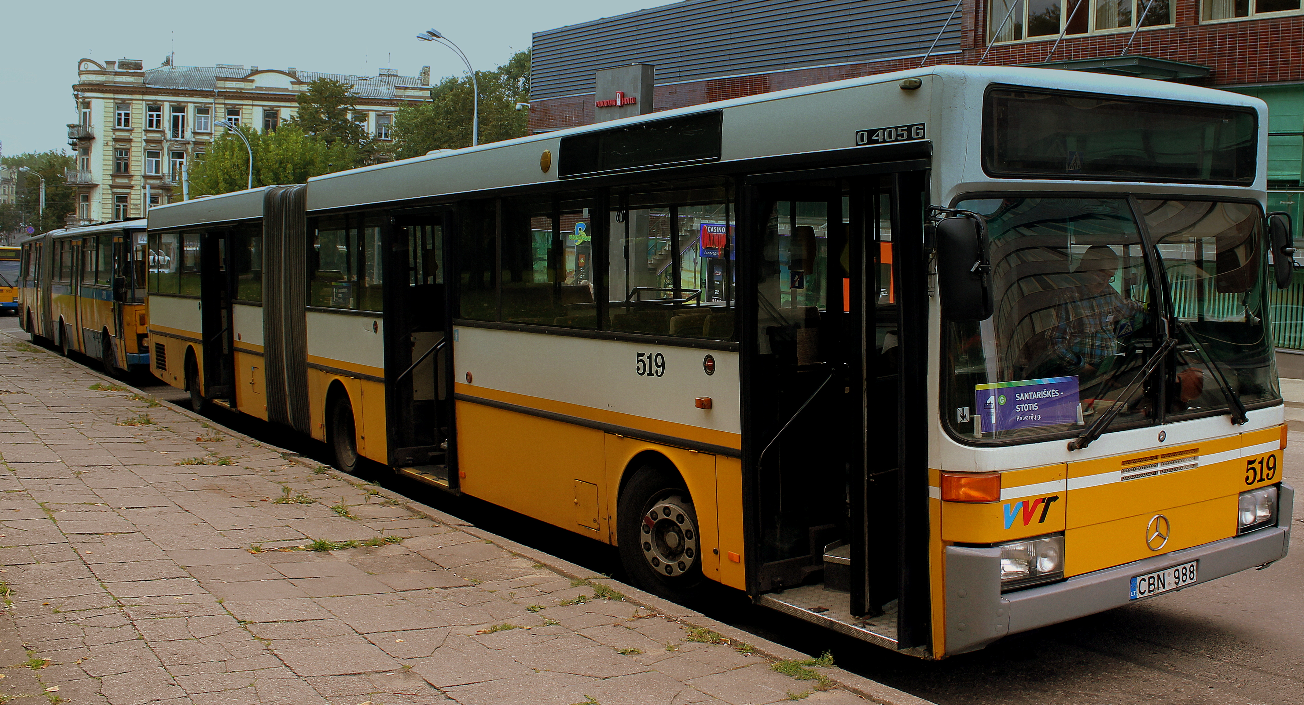 MERCEDES-BENZ BUS VVT VILLINUS LITHUANIA SEP 2013